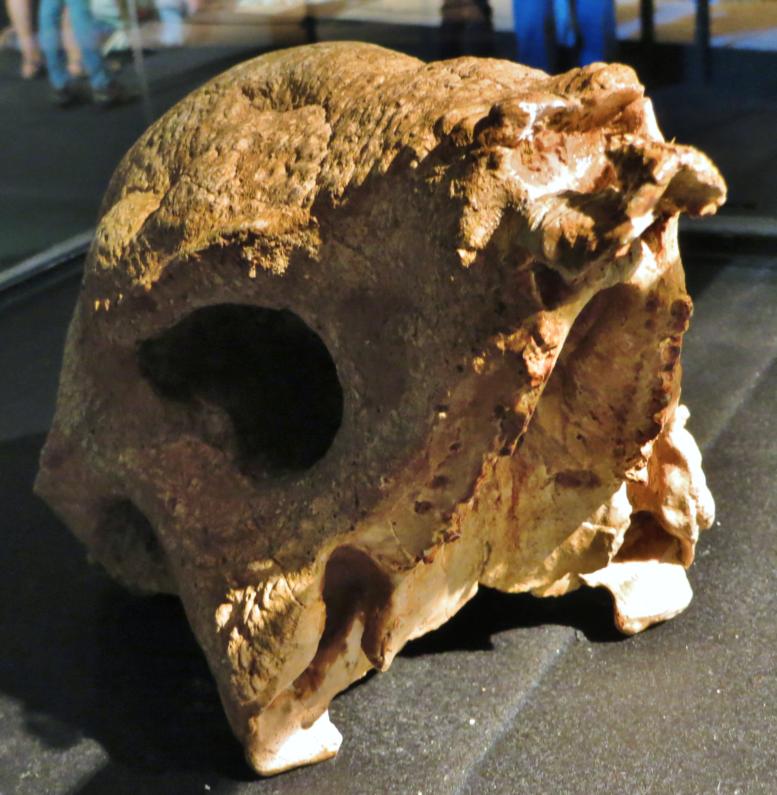 Fossil of Prenocephale, an extinct reptile- Took the picture at Dinosaurium, Prague